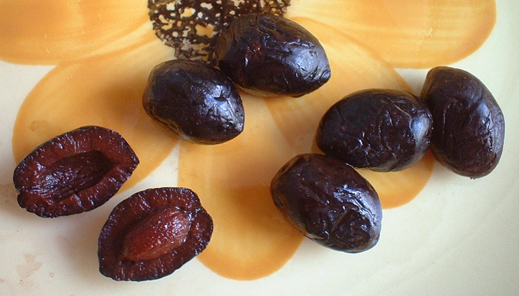 Olives grecques avec une olive coupée pour montrer la chair et le noyau